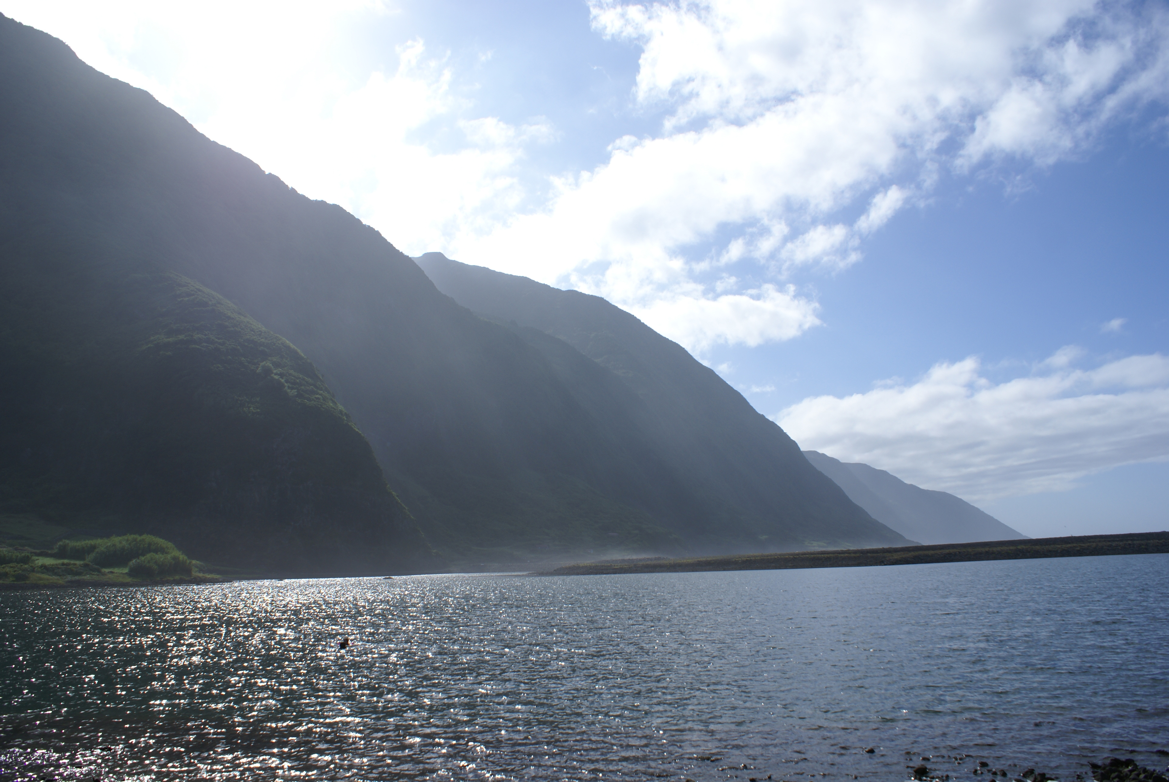 Fajã de Santo Cristo, lagoa 4, Calheta, ilha de São Jorge, Açores